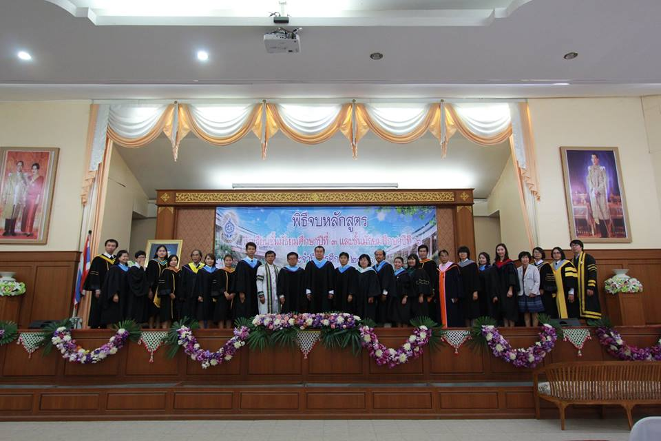 พิธีปัจฉิมนิเทศและจบหลักสูตร ส.ว. 5